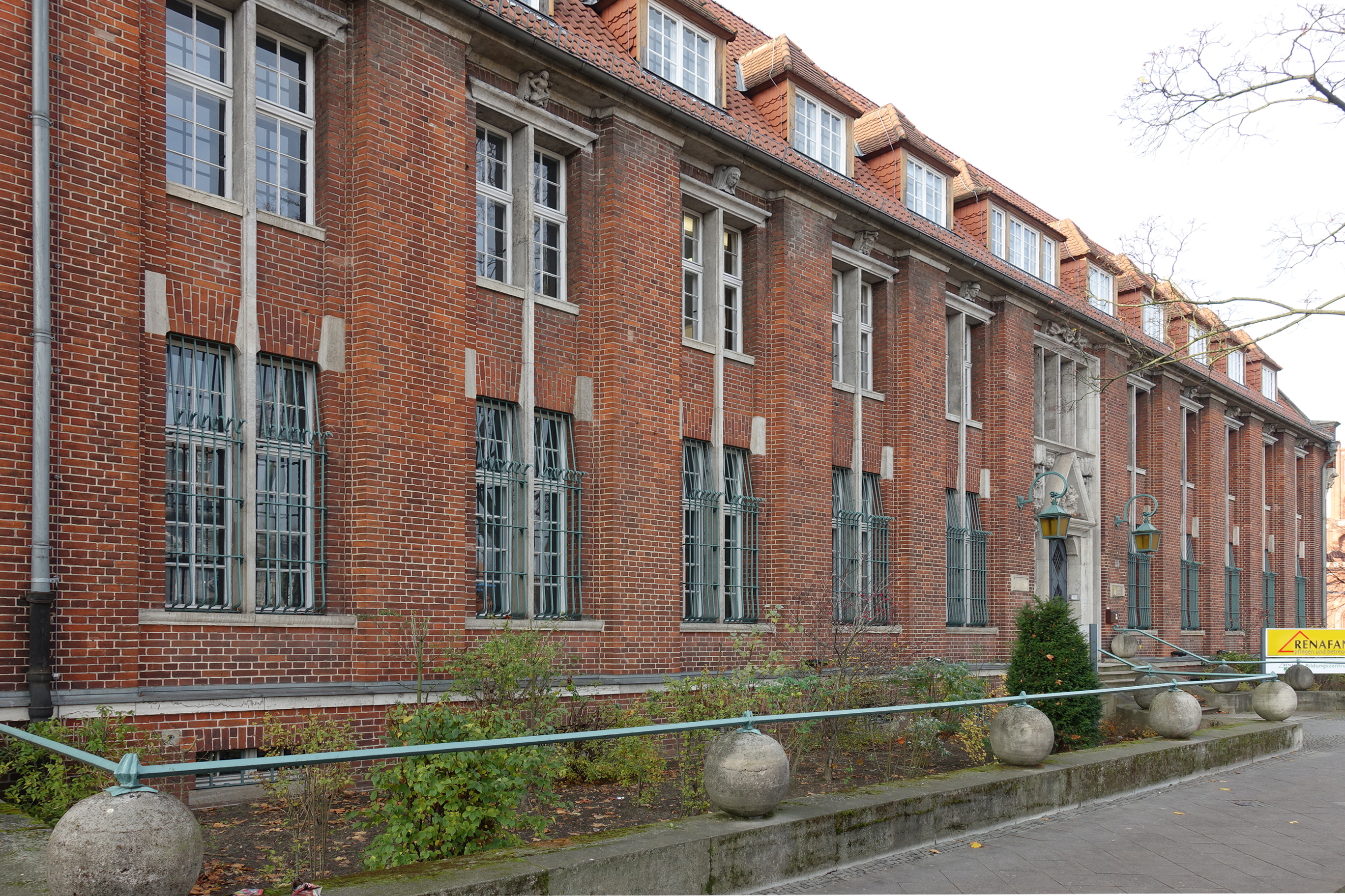 ehemaliges Lohnbüro und Kantine